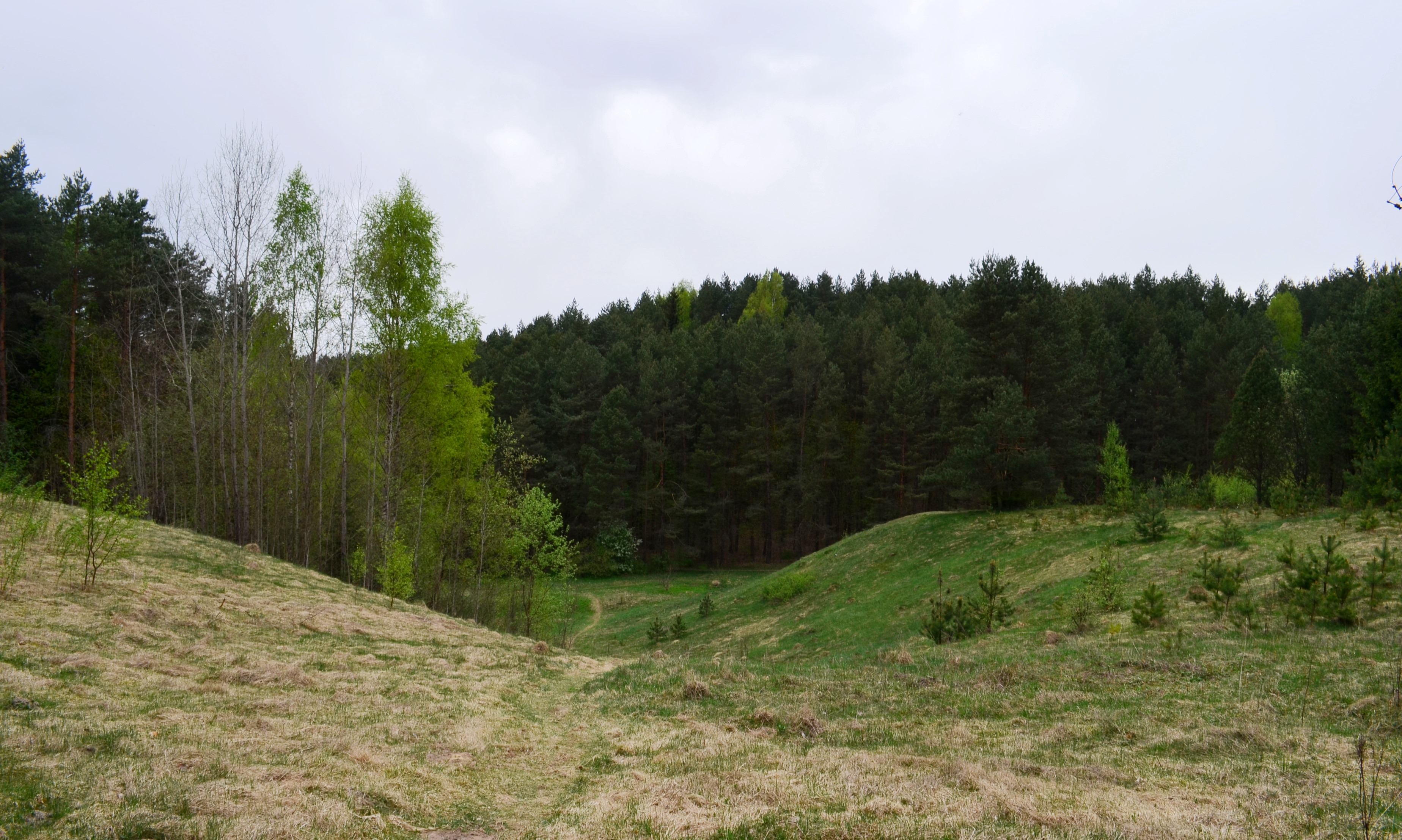 Dauba šalia "Anapilio" stotelės, Pavilnių RP, Rokantiškės/Mileišiškės, Vilnius